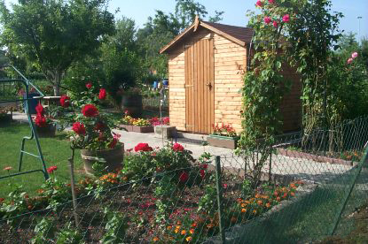 Fédération des jardins familiaux de l'agglomération de Reims. Jardins Associatifs de la Communauté d'Agglomération de Reims. Photo prise par Didier KLODAWSKI.